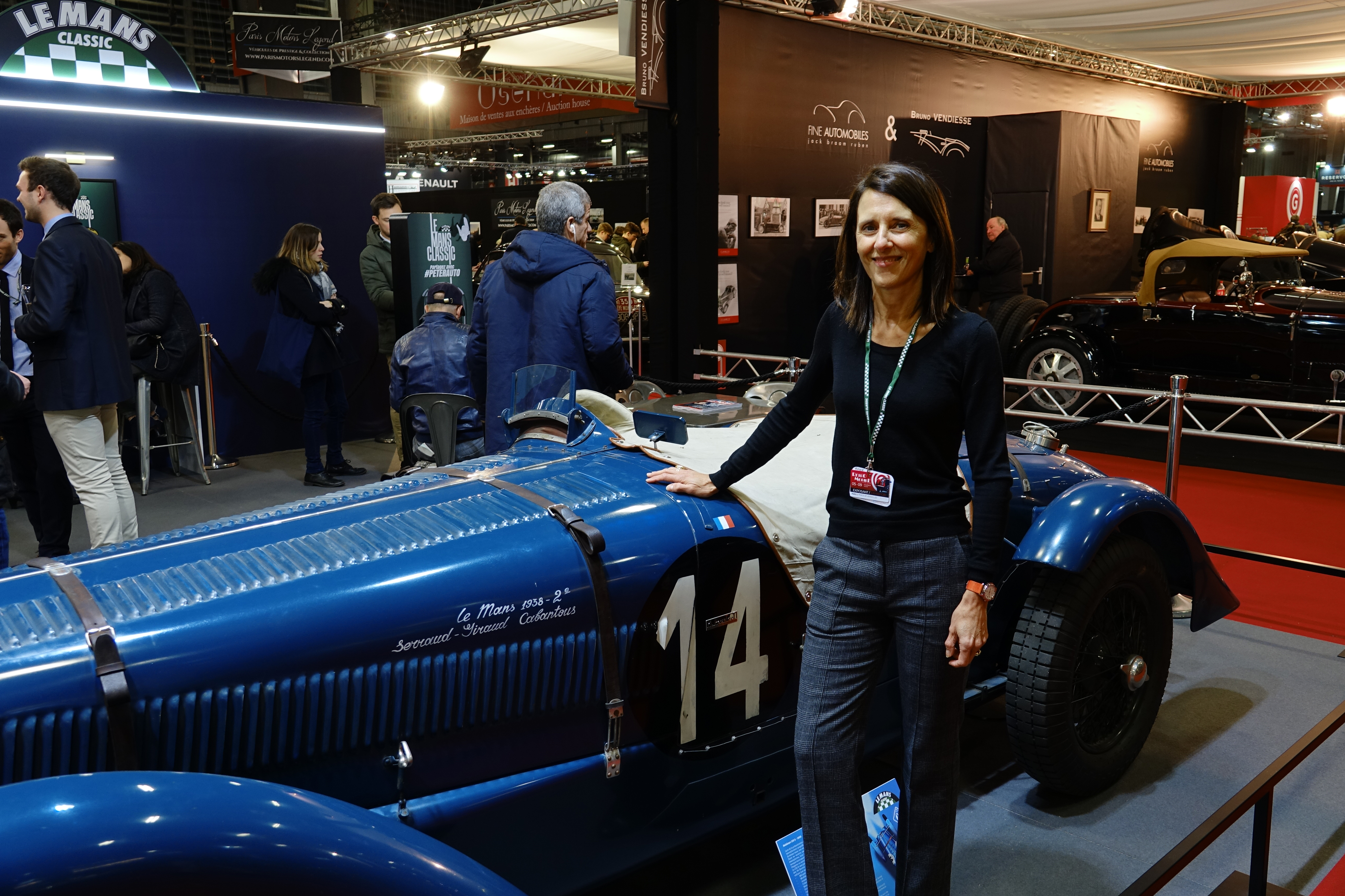 Isabel Lebon (Peter Auto) au salon Rétromobile 2020